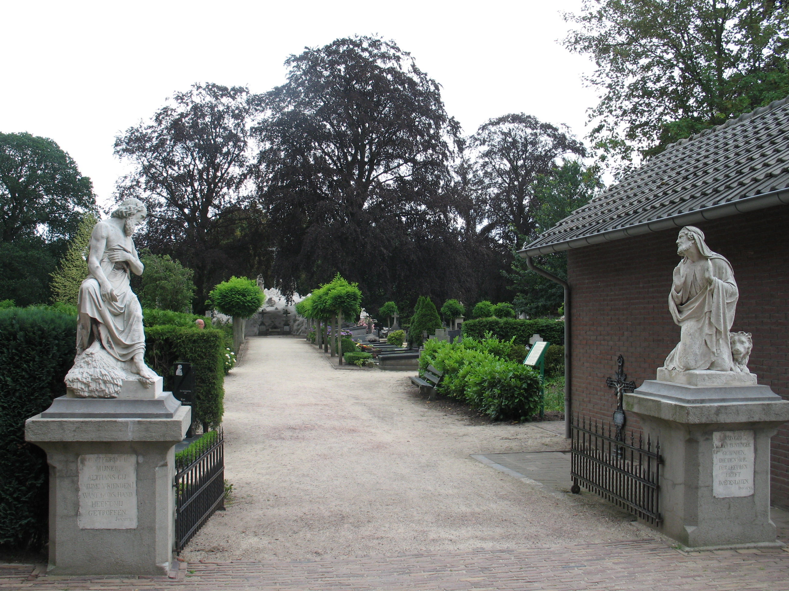 Ingangshek met beelden aan weerszijden